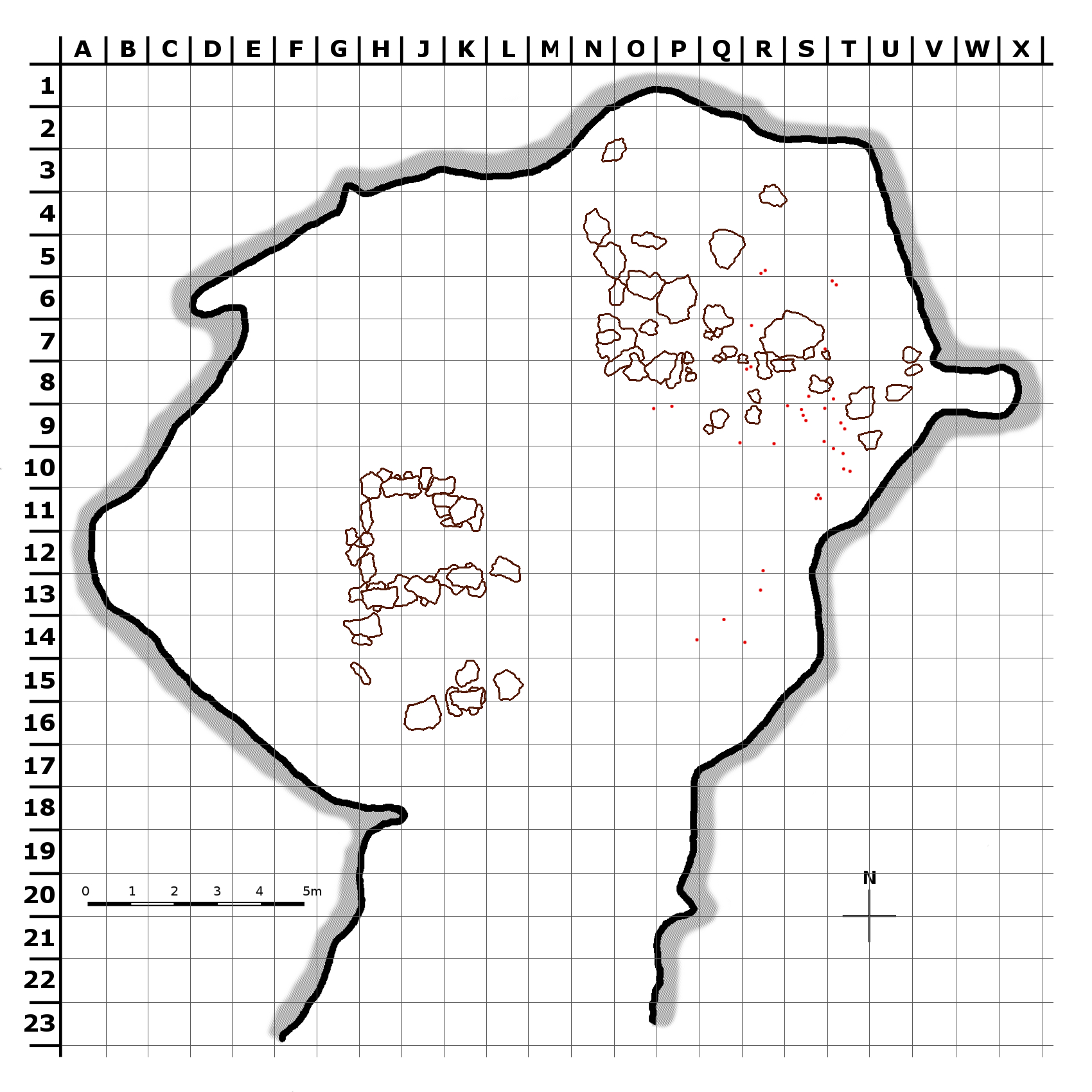 Grundriss der Brillenhöhle bei Blaubeuren. Fundlage der Elfenbeinanhänger (rot) und Steinblöcke (braun) des kleinen und großen Steingehäuses. Grafik nach Abb. 16, Seite 112; Abb. 2, Seite 74 und Beilage 1 aus "Das Paläolithikum der Brillenhöhle bei Blaubeuren, Teil 4/I", Gustav Riek 1973.